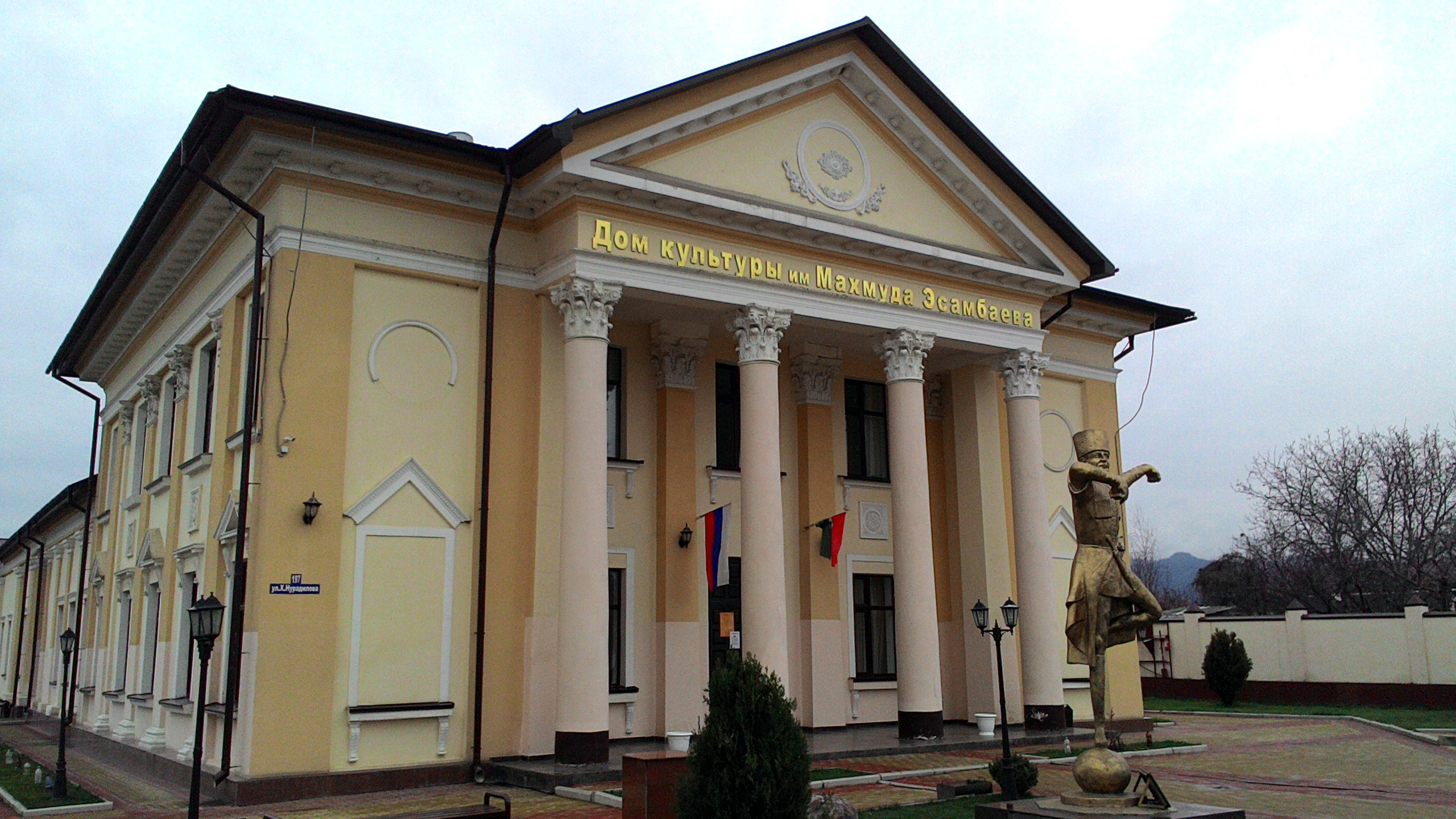 Дом культуры в селе Старые Атаги